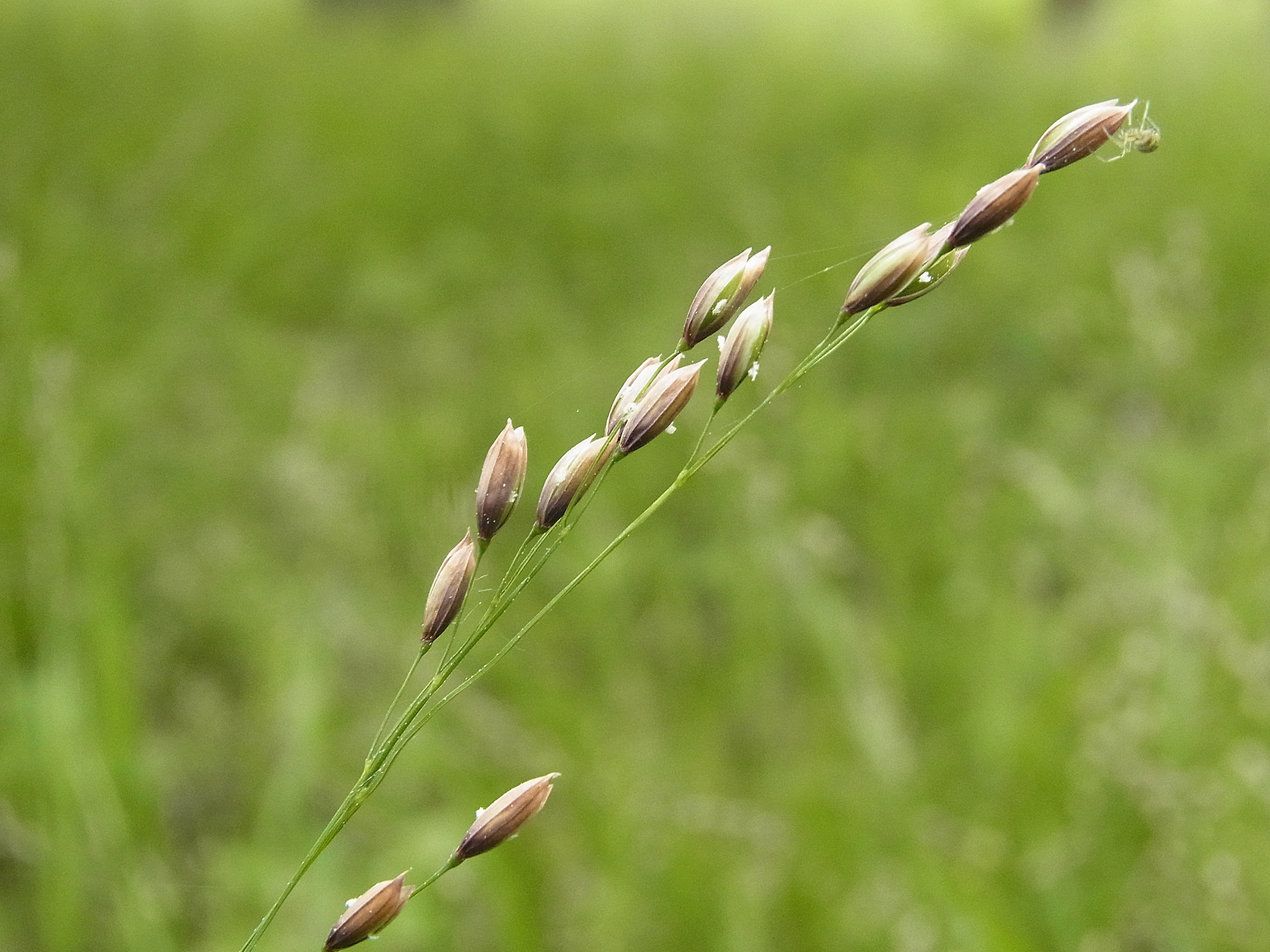 Einblütiges Perlgras (Melica uniflora) in einem Waldstück bei Barnstorf (Wolfsburg), Niedersachsen, Deutschland